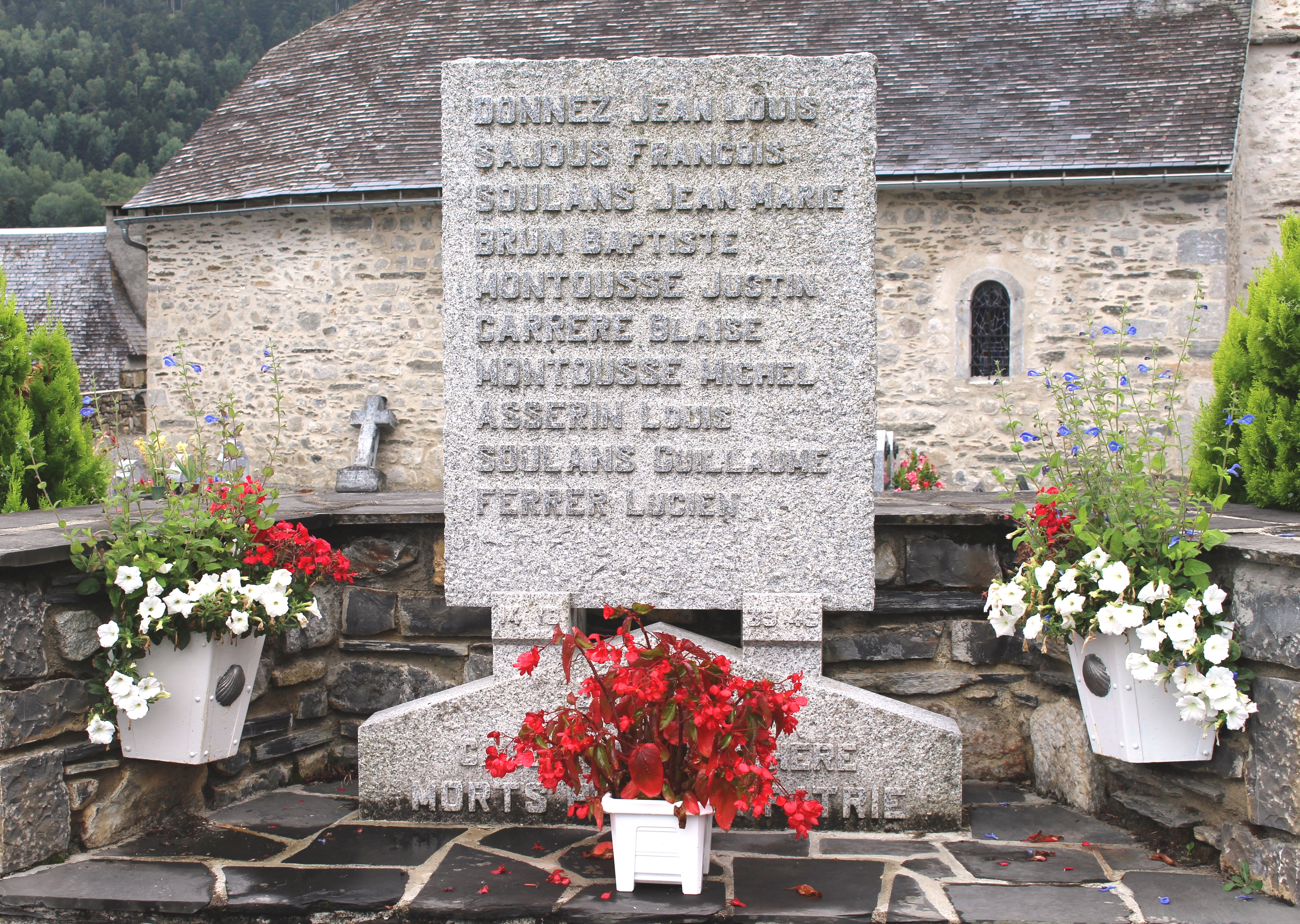 Monument aux morts de Cadeilhan-Trachère (Hautes-Pyrénées)